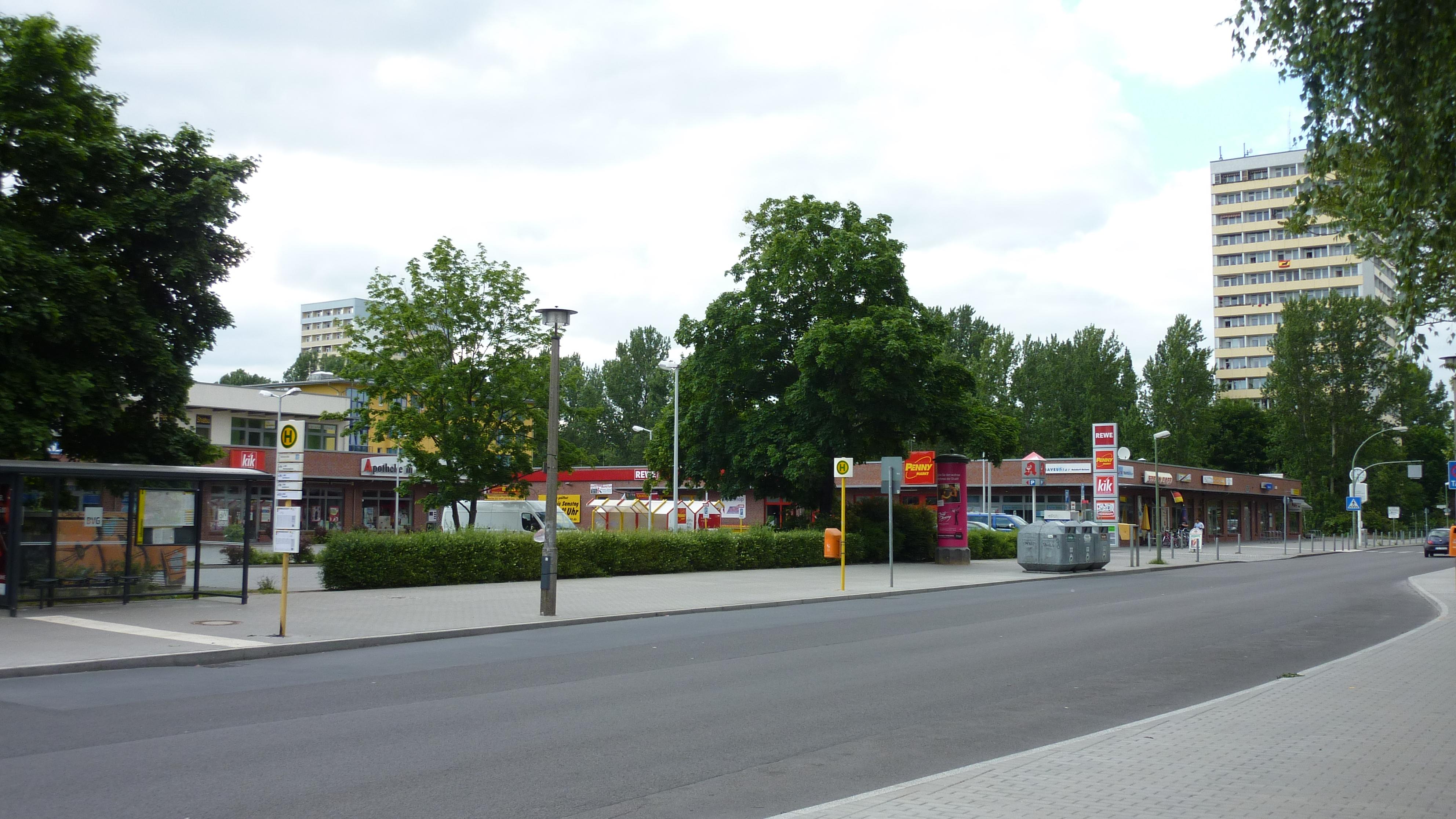 Geschäftsplatz in der Volkradstraße in Berlin-Friedrichsfelde, Blickrichtung Nordwesten.